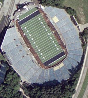 Rubber Bowl in Akron, Ohio satellite image taken in 2002.